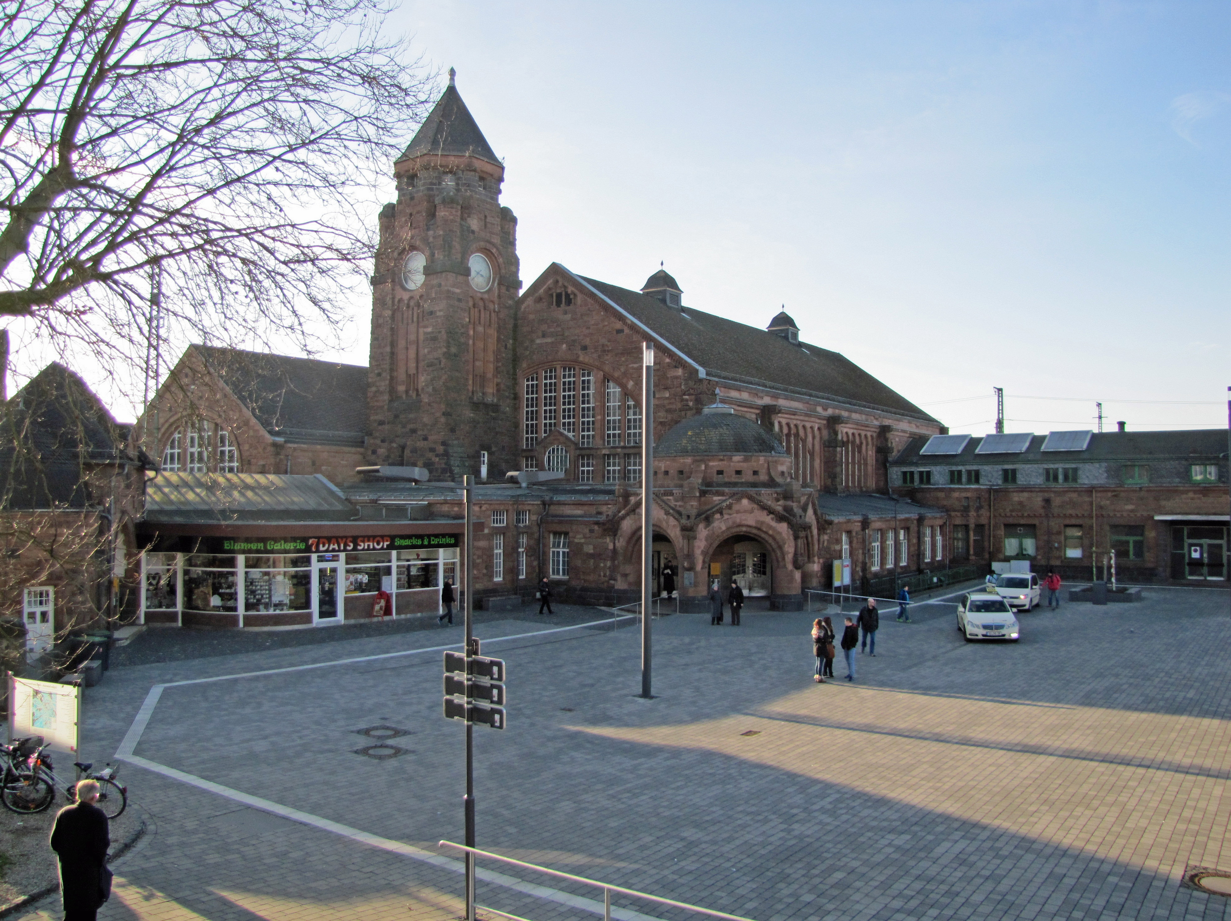 Hauptbahnhof , 2015 in Giessen, von der Bahnhofstrasse aus.